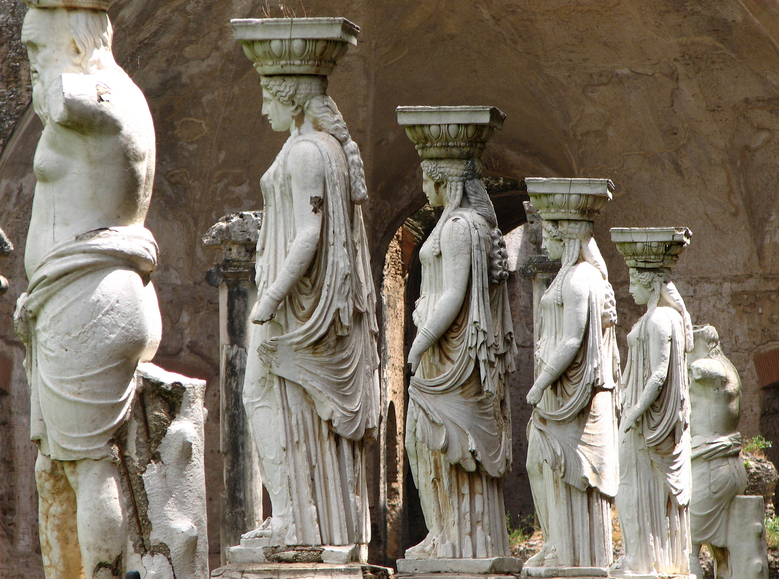 The Canopus in the Villa Adriana in Tivoli, Lazio, ItaliaIMG_1479 Hadrian's Villa